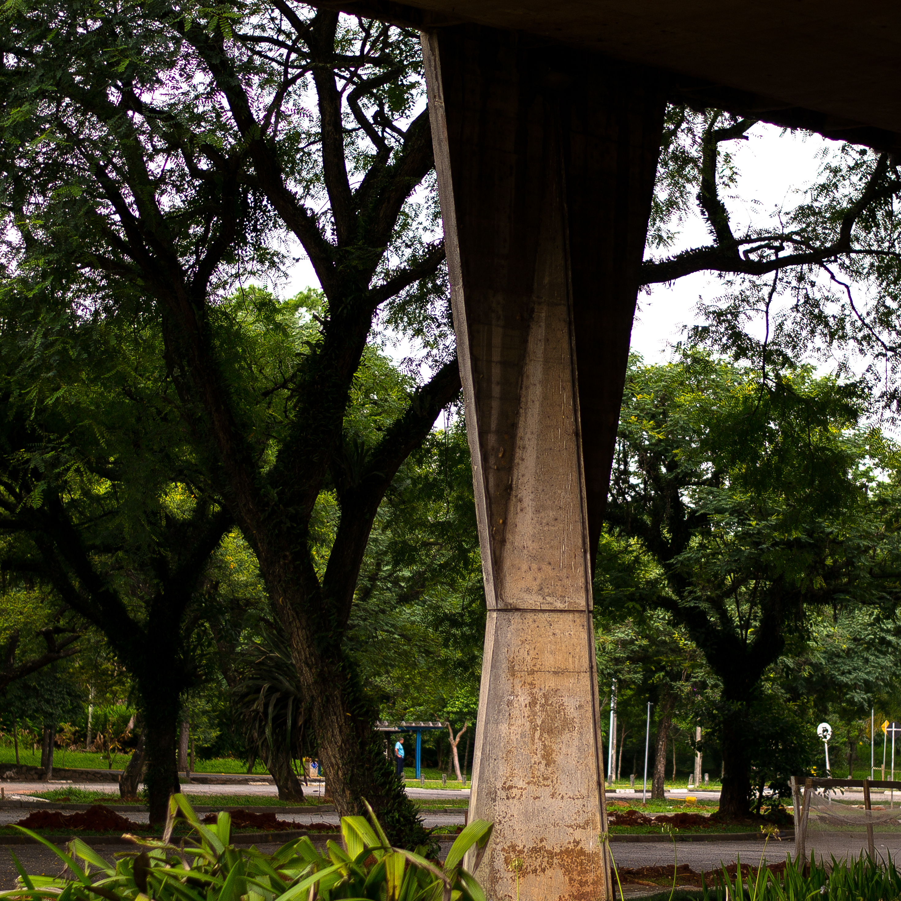 Faculdade de Arquitetura e Urbanismo da Universidade de São Paulo. 30 de Dezembro de 2013, Facebook || Instagram || Tumblr || Twitter || VSCO Grid